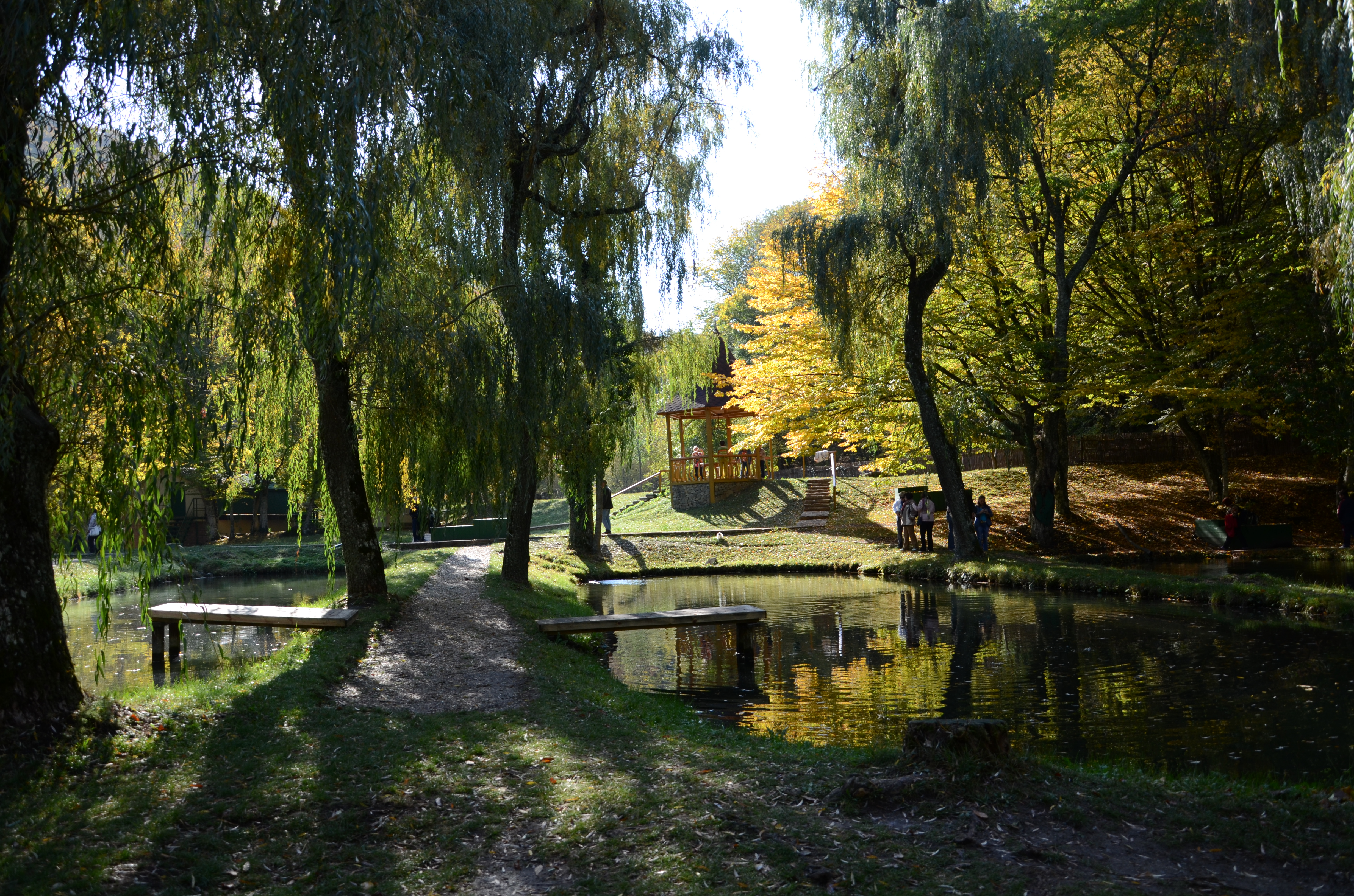 Парк_в_Алуштинском_заповеднике_(2)